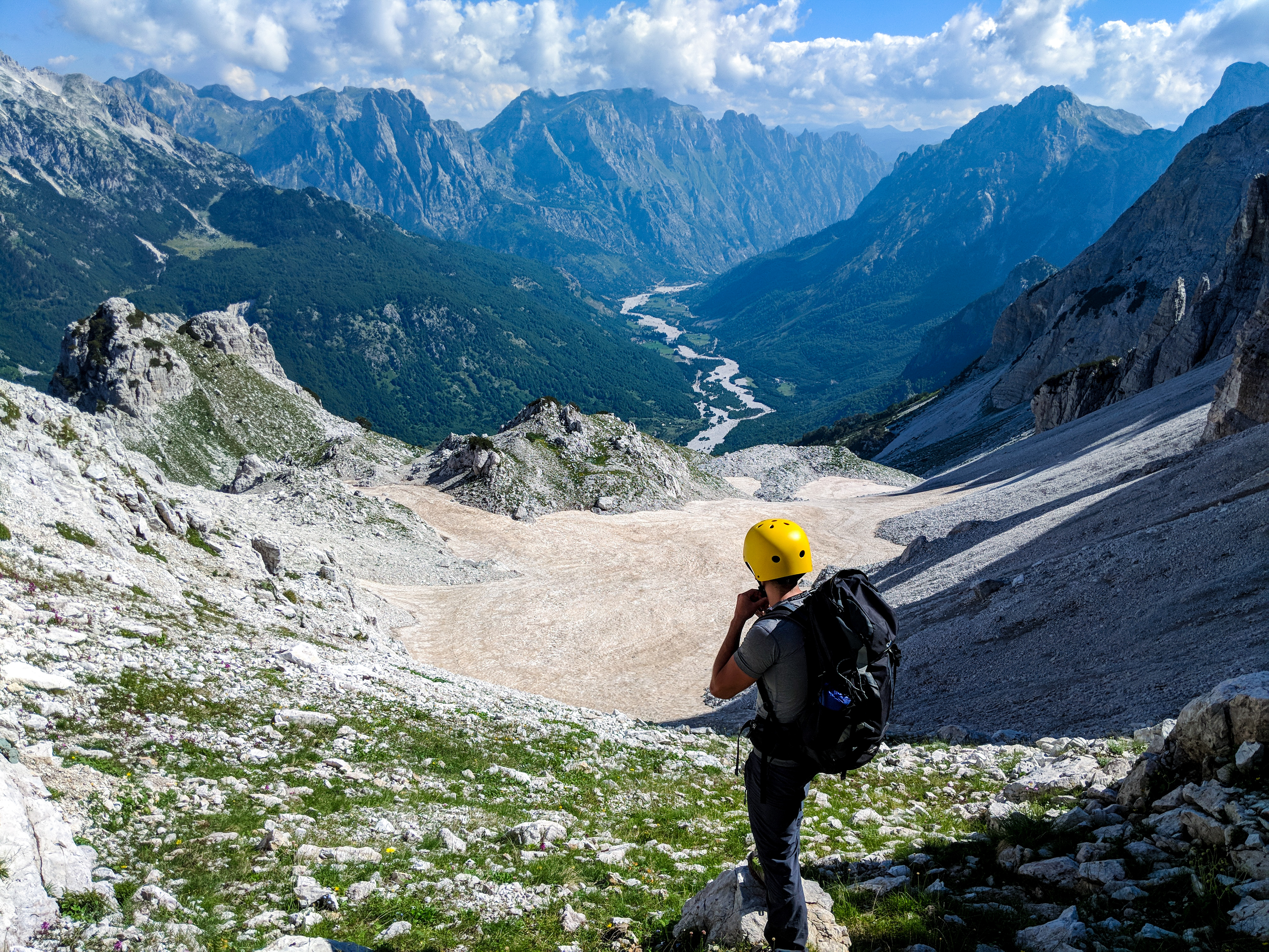 Maja e Boshit, Lugina e Valbones, Valbone, Bajram Curr